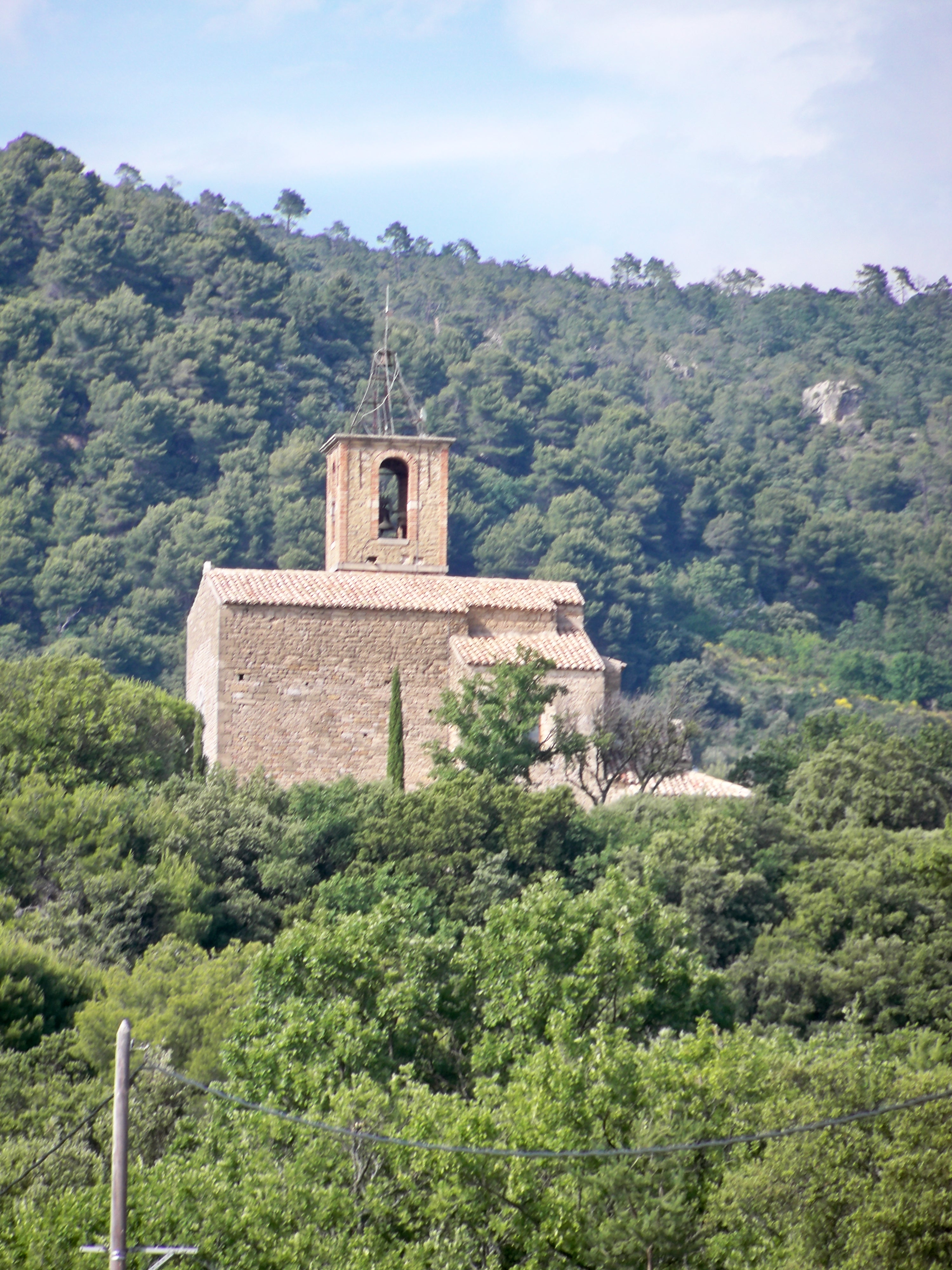 Mérindol-les-Oliviers (Drôme, France). Église Notre-Dame de Porporières.